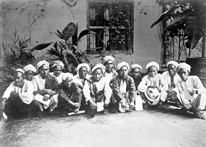 Para Peziarah Mandailing saat ke Mekkah, di kedutaan Hindia Belanda di Jeddah, Arab Saudi